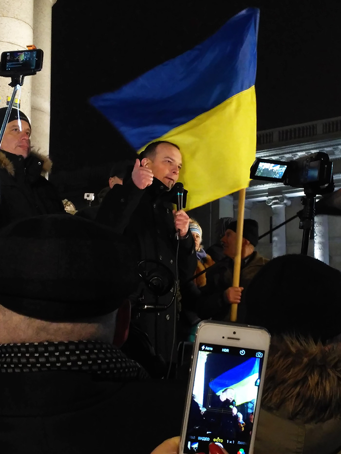 Єгор Соболєв на мітингу "блокадного майдану", Київ, 20 лютого 2017.